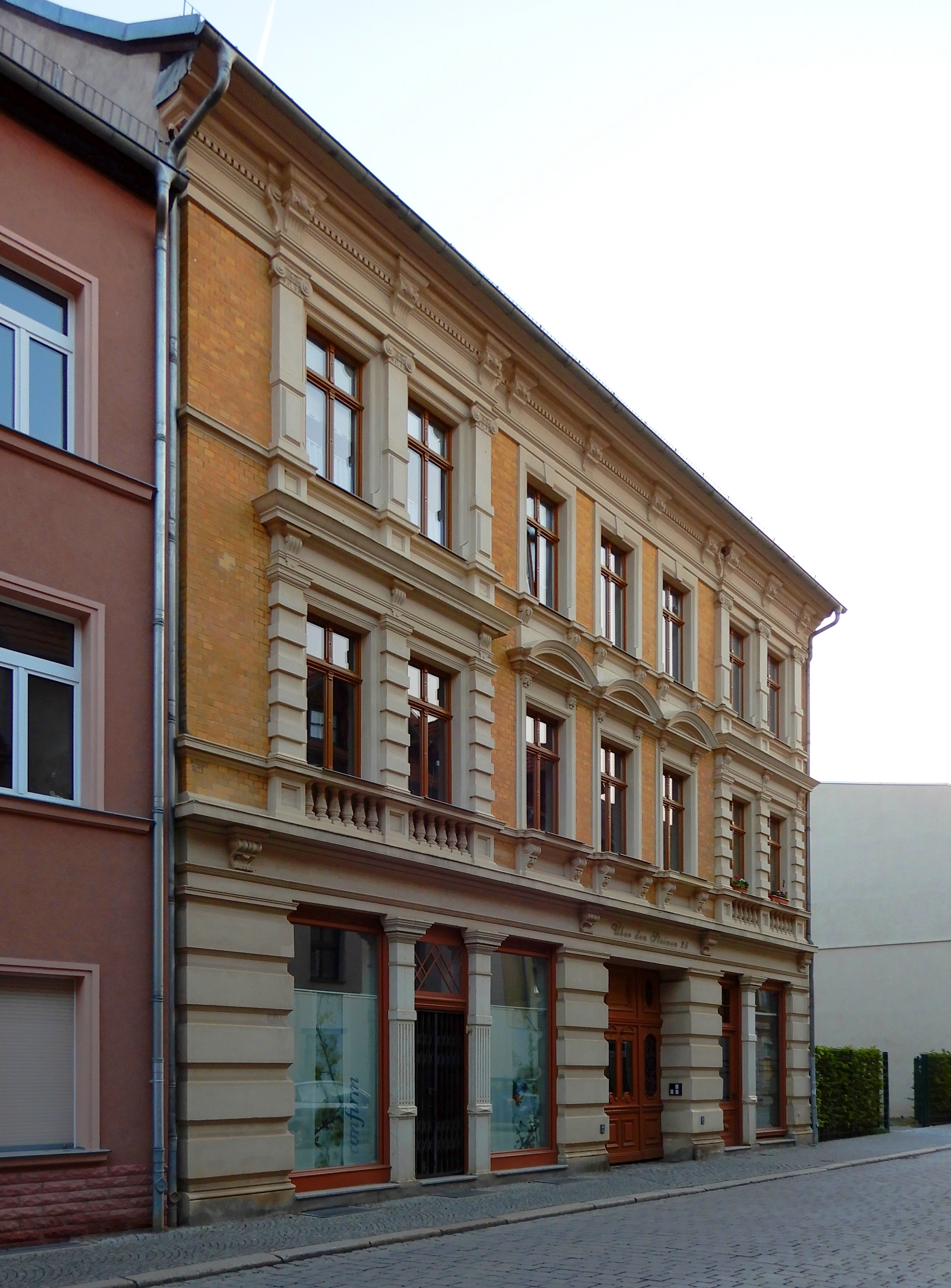 Gebäude Über den Steinen 25 in Aschersleben